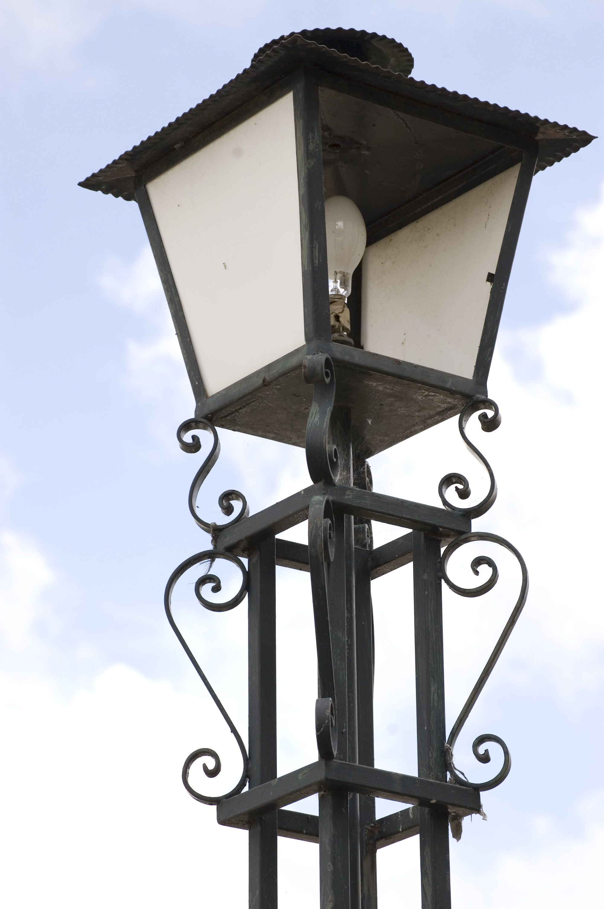 Candeeiro junto à Igreja de Santa Leocádia de Briteiros.